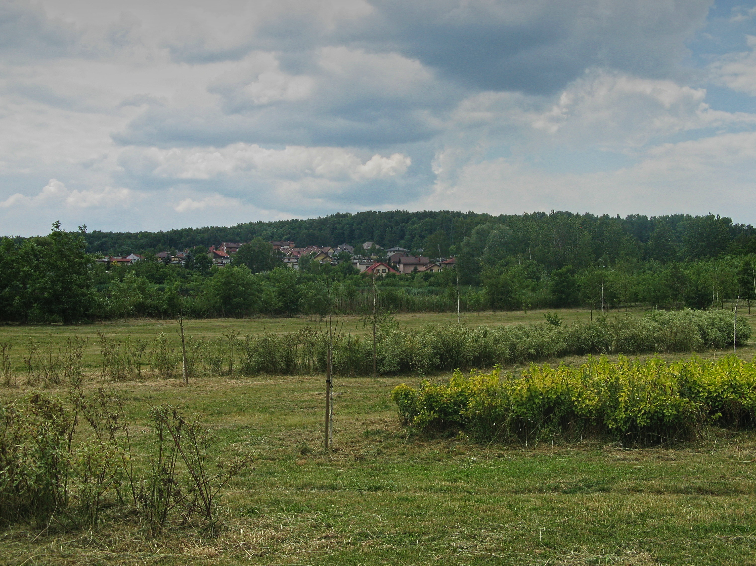 Góra Hugona (Wzgórze Hugona, Hugoberg) w Świętochłowicach, widok od północnego wschodu z okolicy ulicy Nowej w pobliżu stawu Kalina